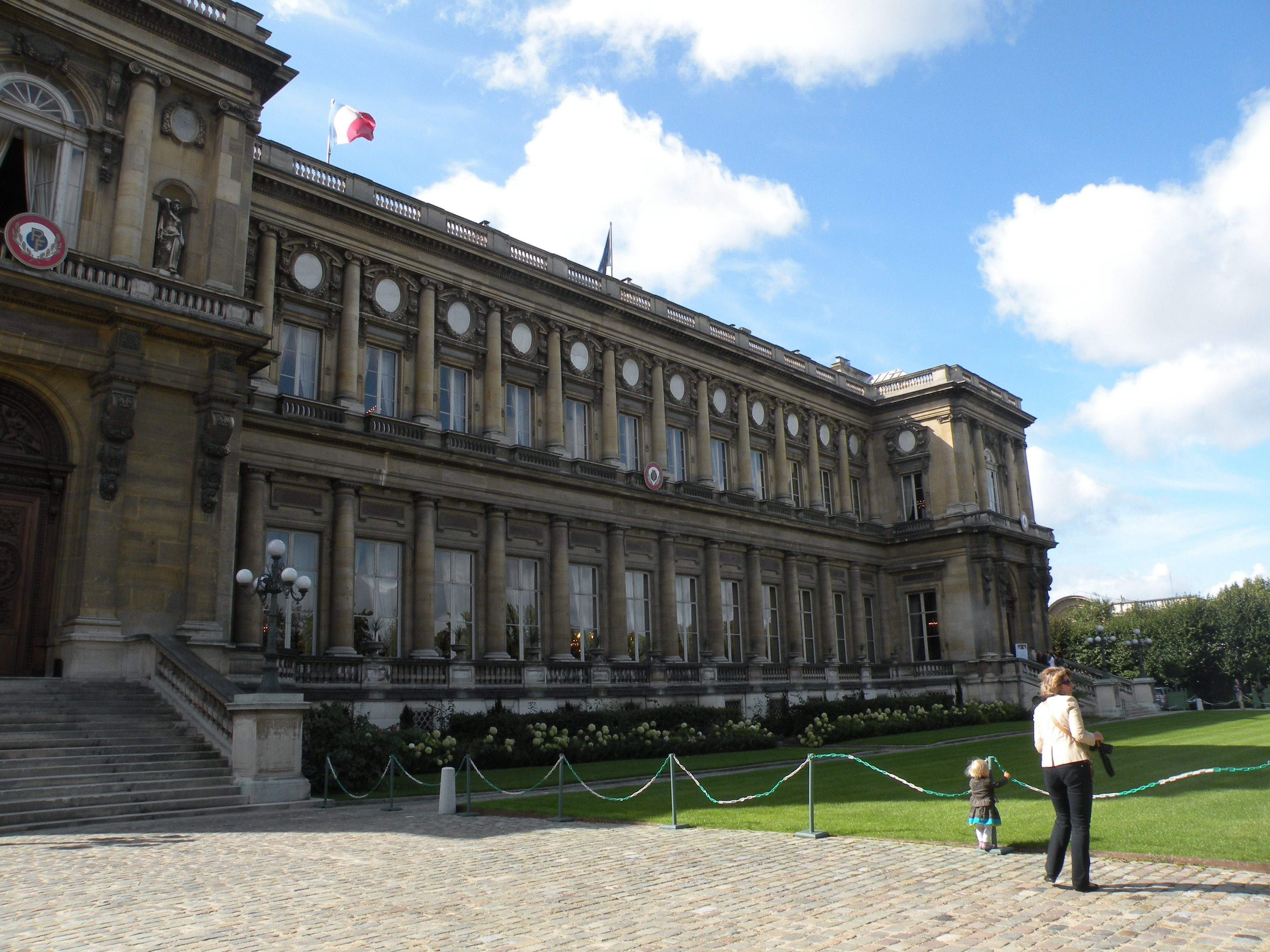 facade